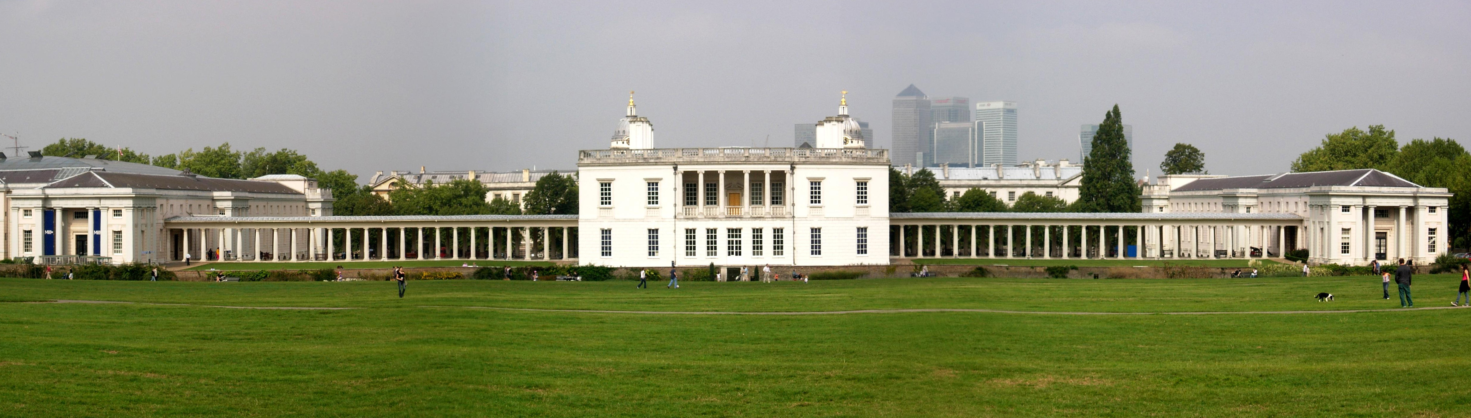 Greenwich